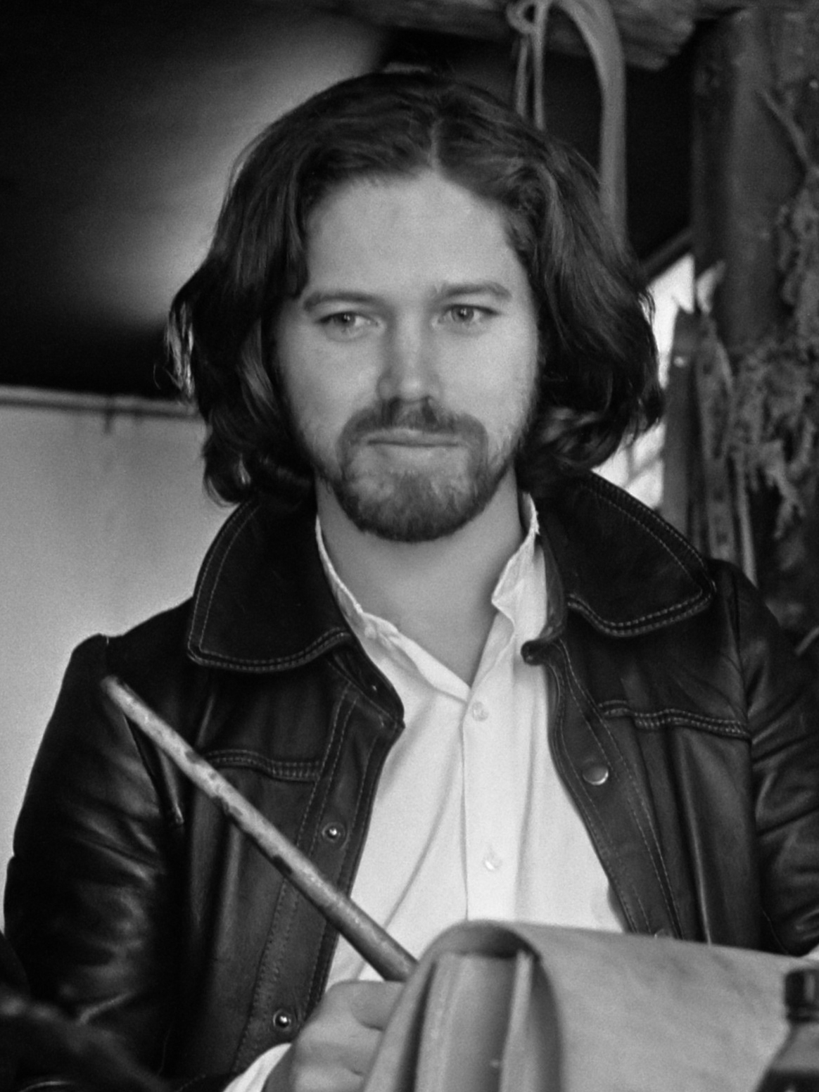 Fred de la Bretonniere , opdracht Volkskrant 12 oktober 1973